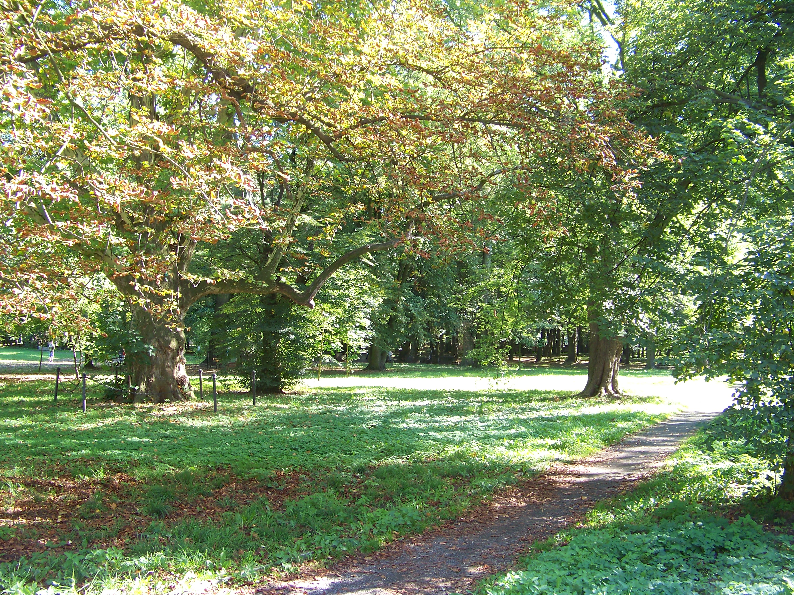 Skorogoszcz - park pałacowy (zabytek nr 190/88 z 10.11.1988)